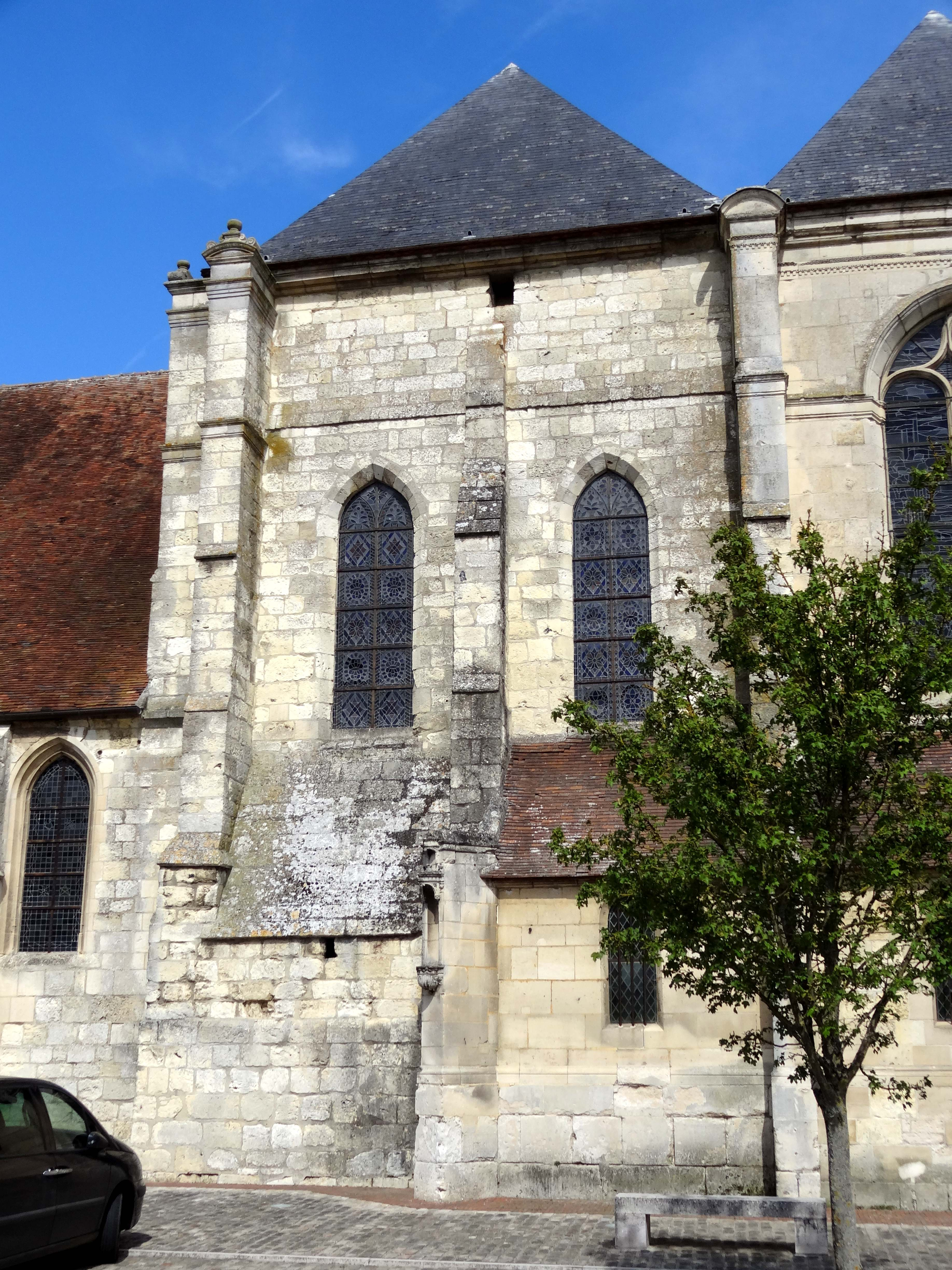 Église Saint-Denis de Remy - voir titre.